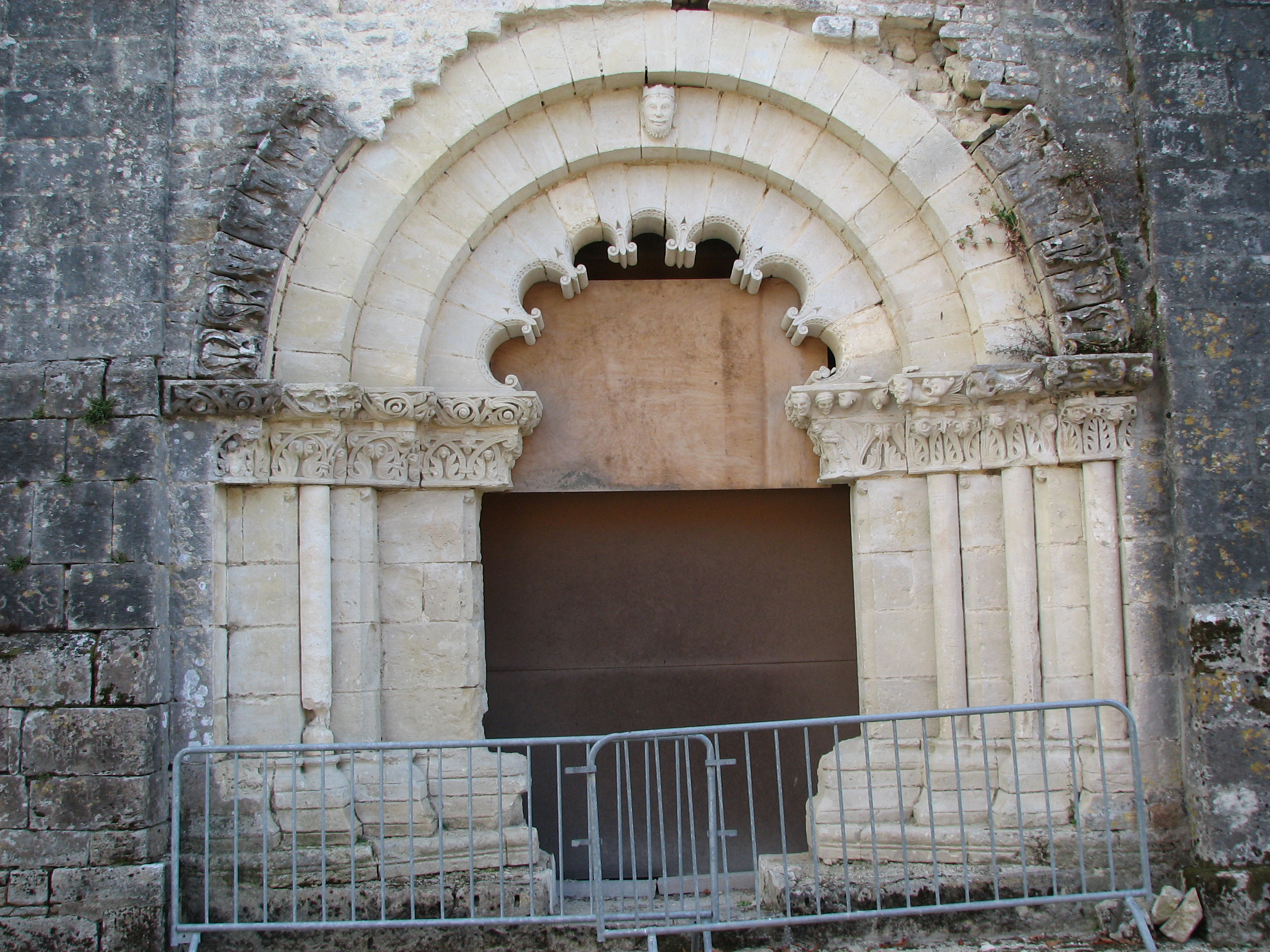 Portail nord mis à jour en 2008-2009